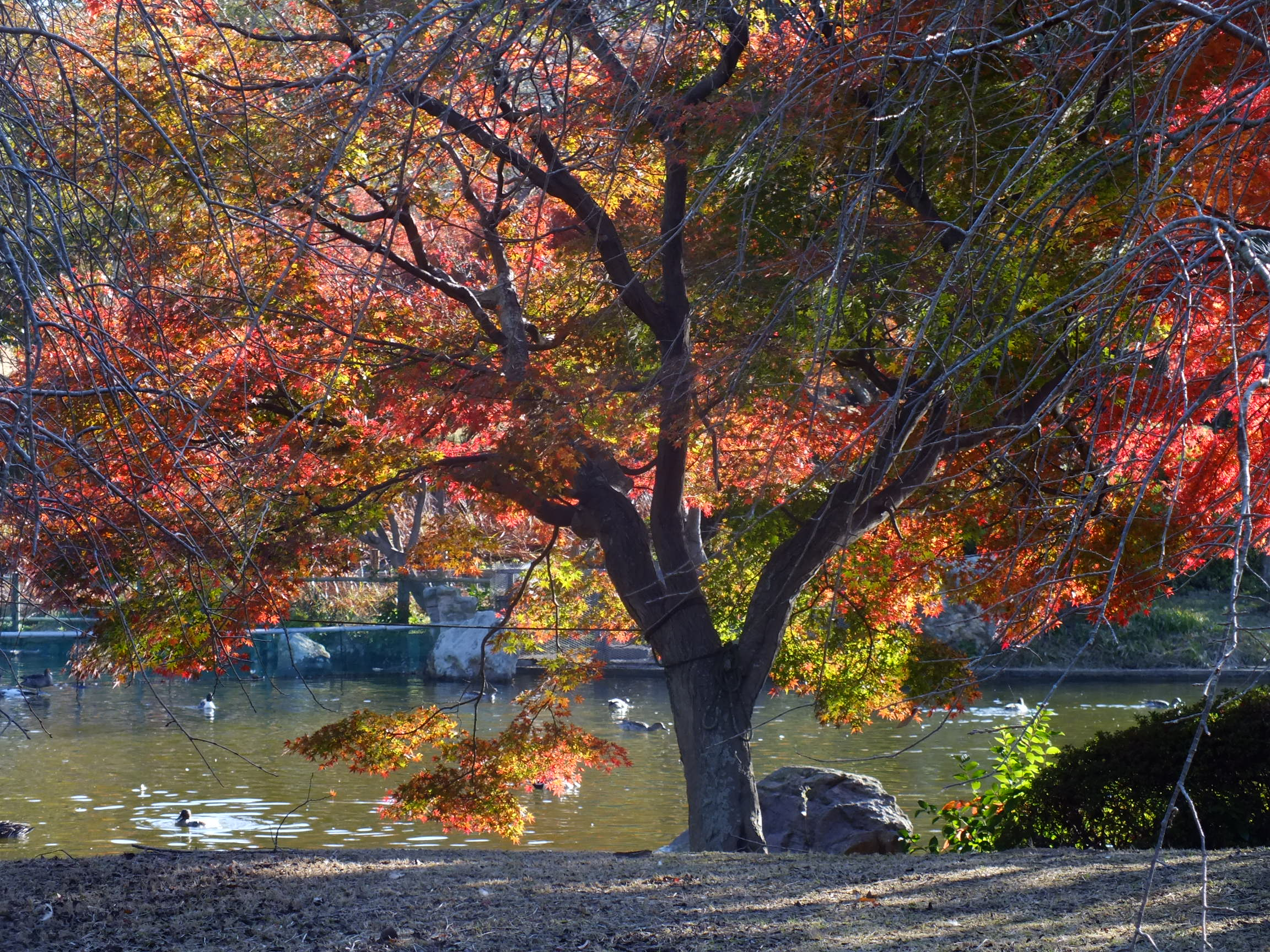 入園 無料 開園時間 常時開設 管理事務所 ８：３０～１７：００ 電話：0438-63-6560 住所 千葉県袖ケ浦市飯富２３６０